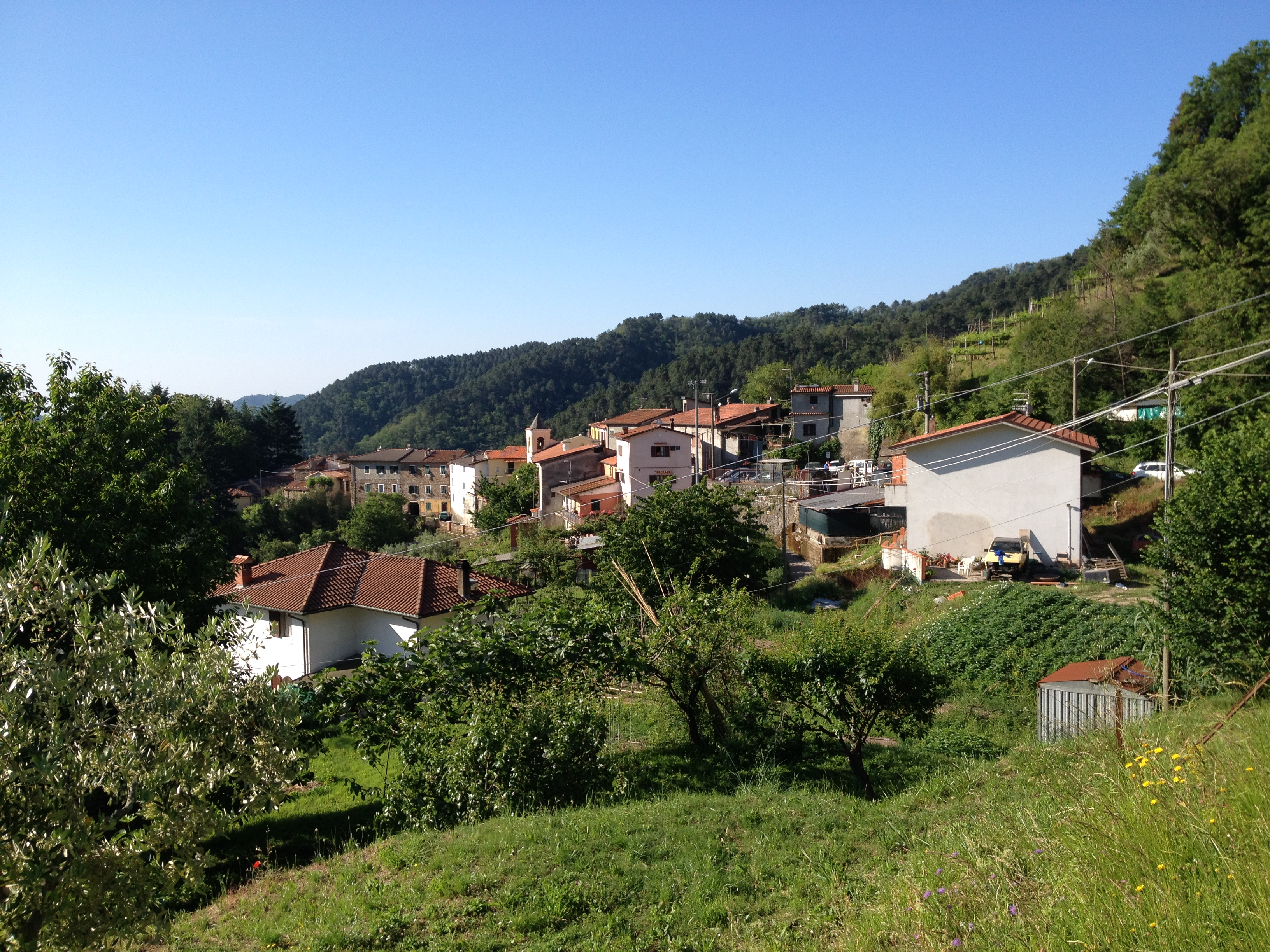 panorama view mountain